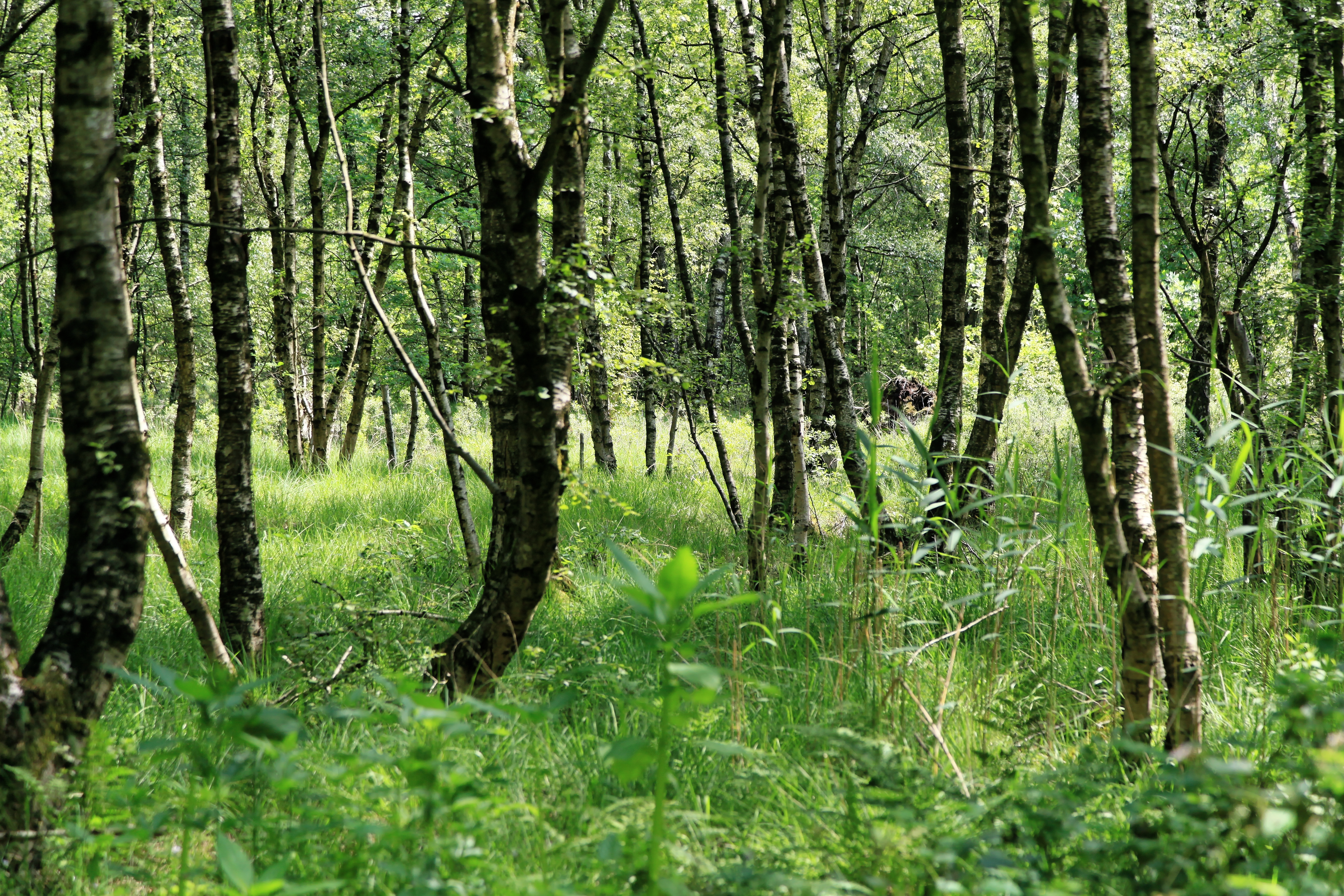 NSG Nenndorfer Mörken, Nenndorfer Straße in Papenburg